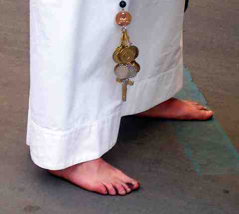 Barfüßige Perdoni (Taranto)